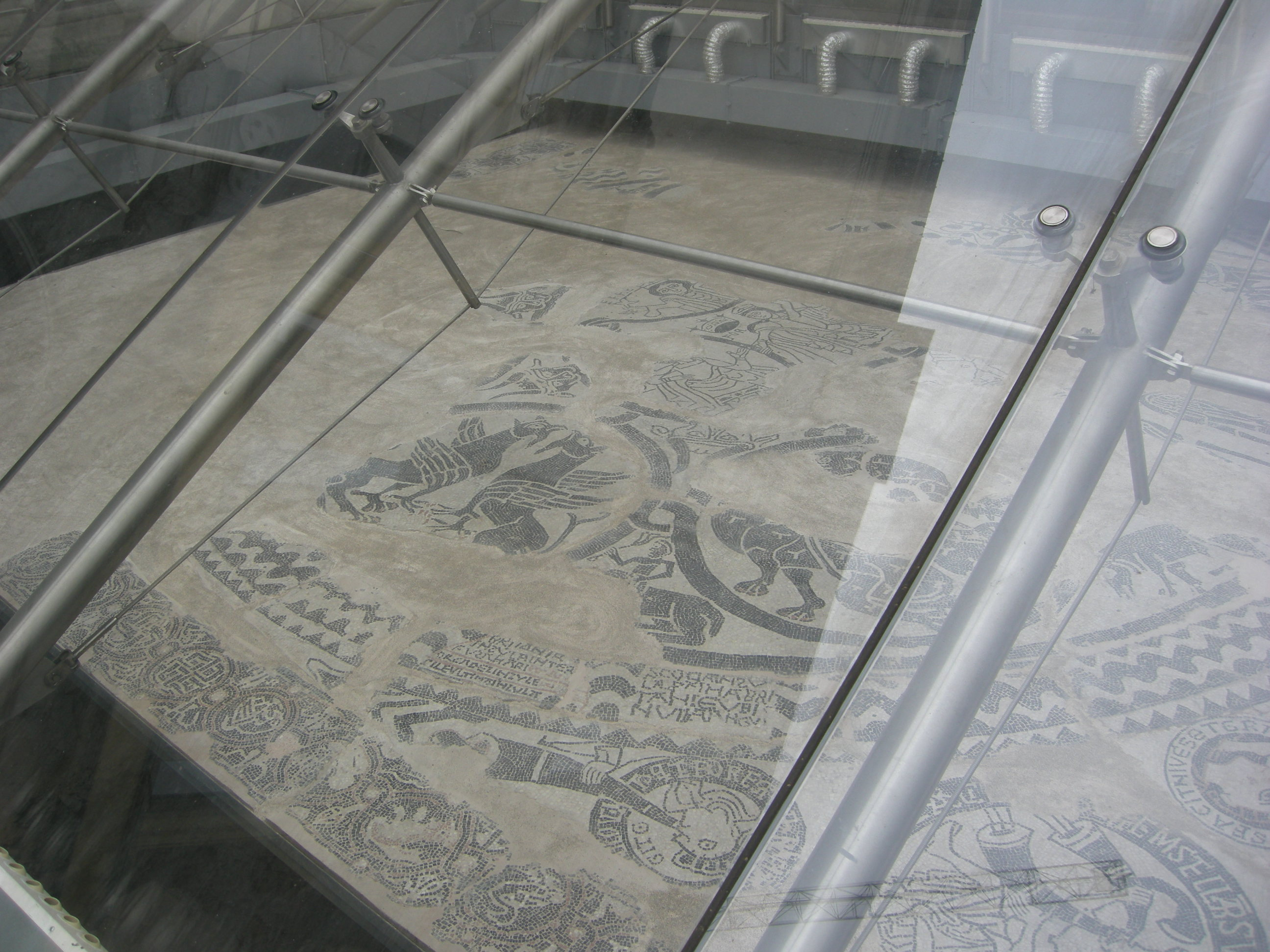 Torino, mosaico della chiesa del salvatore